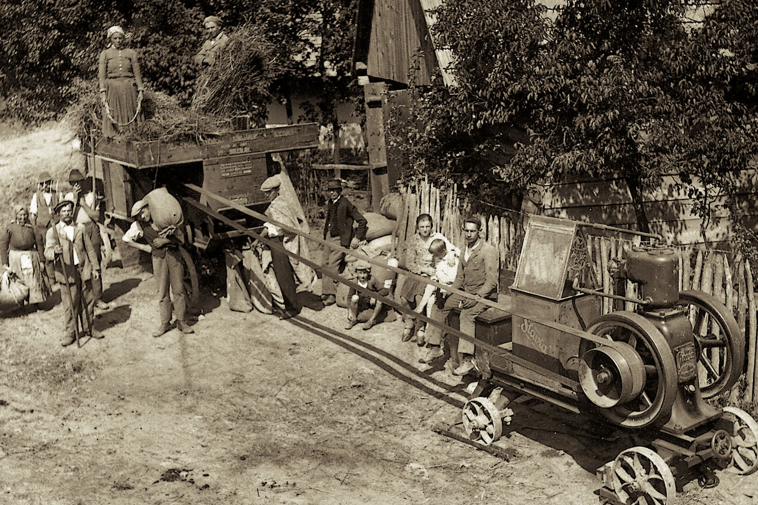 Slavia 4HP motorral hajtott, Mlada Boleslavban készült cséplőgép. Title: Slavia 4HP motorral hajtott, Mlada Boleslavban készült cséplőgép.